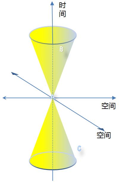 光锥